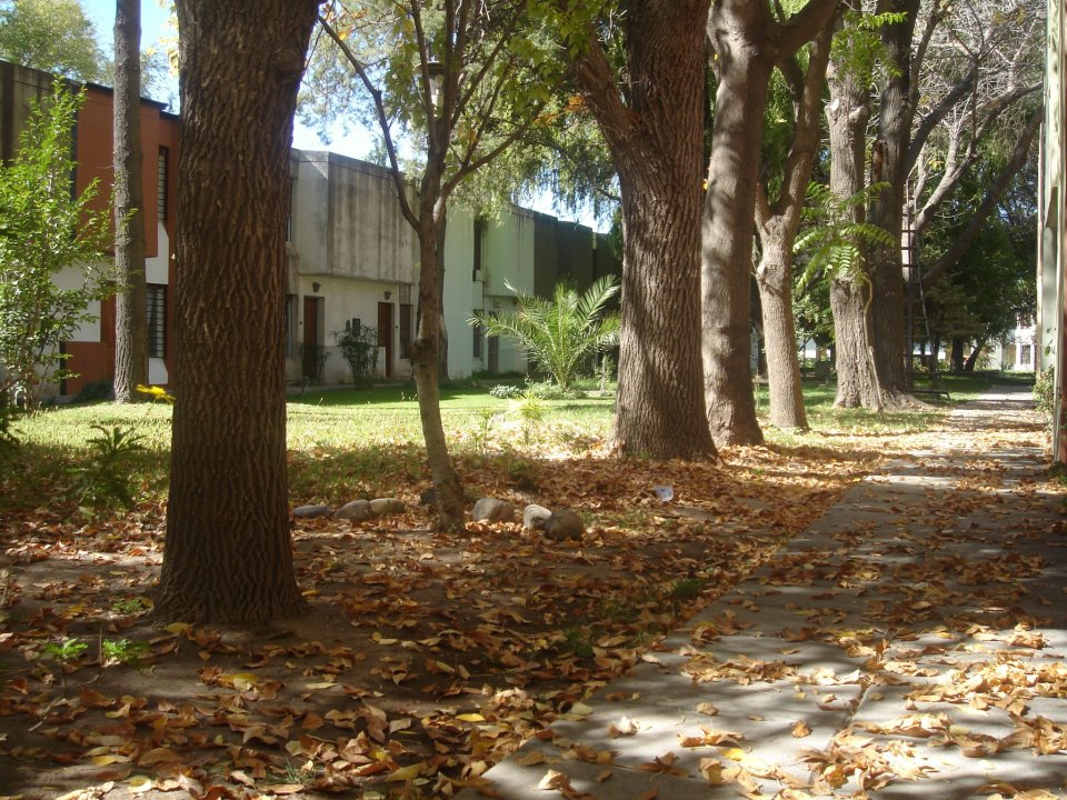 Barrio 12 de septiembre (Cipolletti) en Otoño